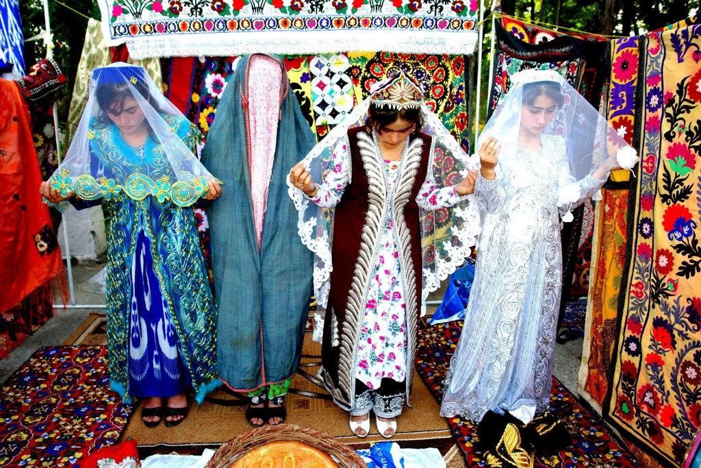 Свадебная церемония в Гиссарском районе Таджикистана,2015 годТоҷикӣ: Маросими тӯйи никоҳ дар ноҳияи Ҳисори Тоҷикистон, соли 2015